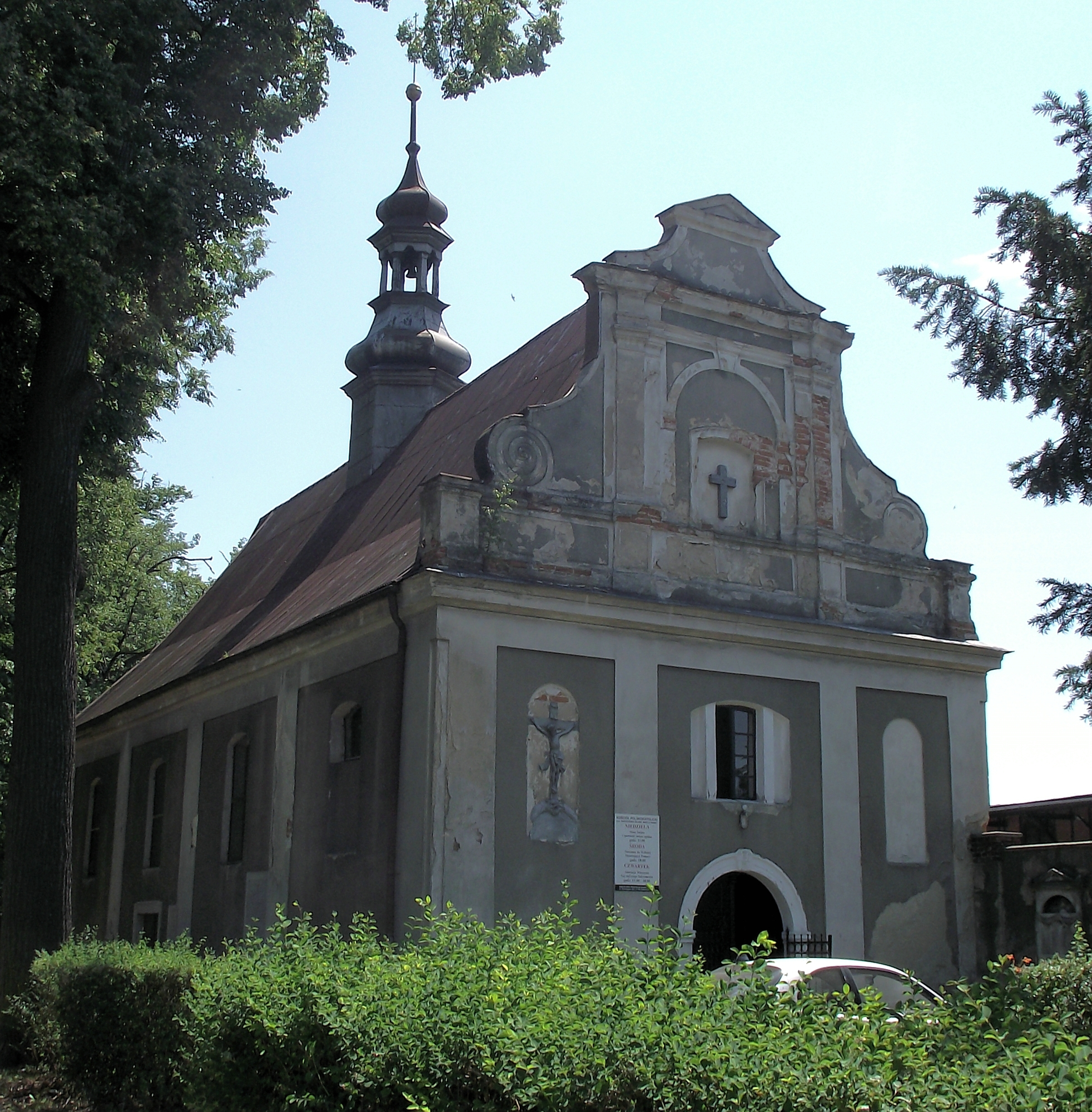 Ząbkowice Śląskie, 1 Maja - dawna kaplica cmentarna, obecnie kościół polskokatolicki pw. Narodzenia NMP (zabytek nr 1874 z 15.10.1966)